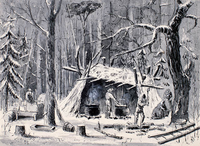 Exploitation de l'eau d'érable pour fabriquer du sucre Aquarelle de William Ogle Carlile de 1873, provenant des Archives Nationales du Canada, référence n°900880.